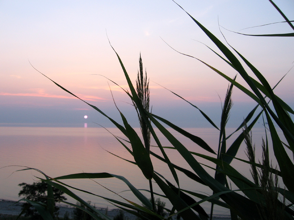 Таганрогский залив Азовского моря